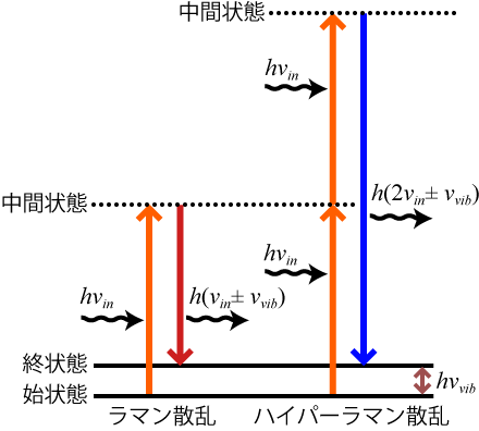 ハイパーラマン散乱過程とラマン散乱過程のエネルギーダイアグラム